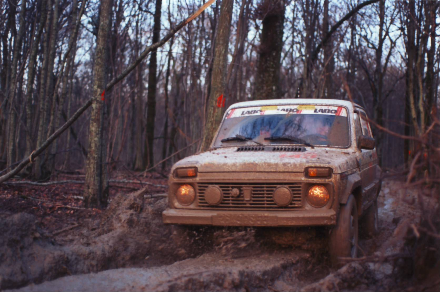 Lada Niva